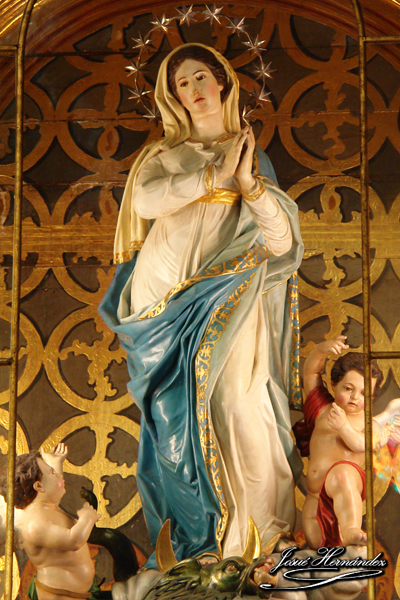 Inmaculada Concepción de María. Génova, 1822 Angelo Olivari Parroquia Matriz de Nuestra Señora de la Concepción, Villa de La Orotava